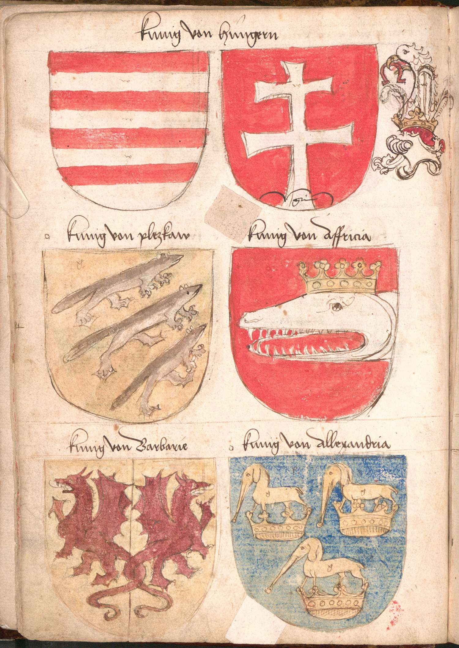 „Wernigeroder (Schaffhausensches) Wappenbuch“; Süddeutschland 4. Viertel 15. Jh.Bayerische Staatsbibliothek München, Cod.icon. 308 n Wappen König von Ungarn, Fabelwesen König von Barbarie, König von Alexandria